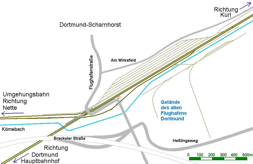 Gleisplan Bahnhof Dortmund-Scharnhorst (Schematisch; nicht alle Gleise dargestellt; Stand 2005)